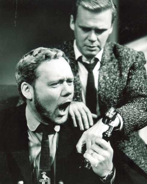 Pjäsfoto. "Fällan" på Intiman i Malmö (Malmö stadsteater). I bild: skådespelarna Olof Thunberg och Bengt Brunskog.